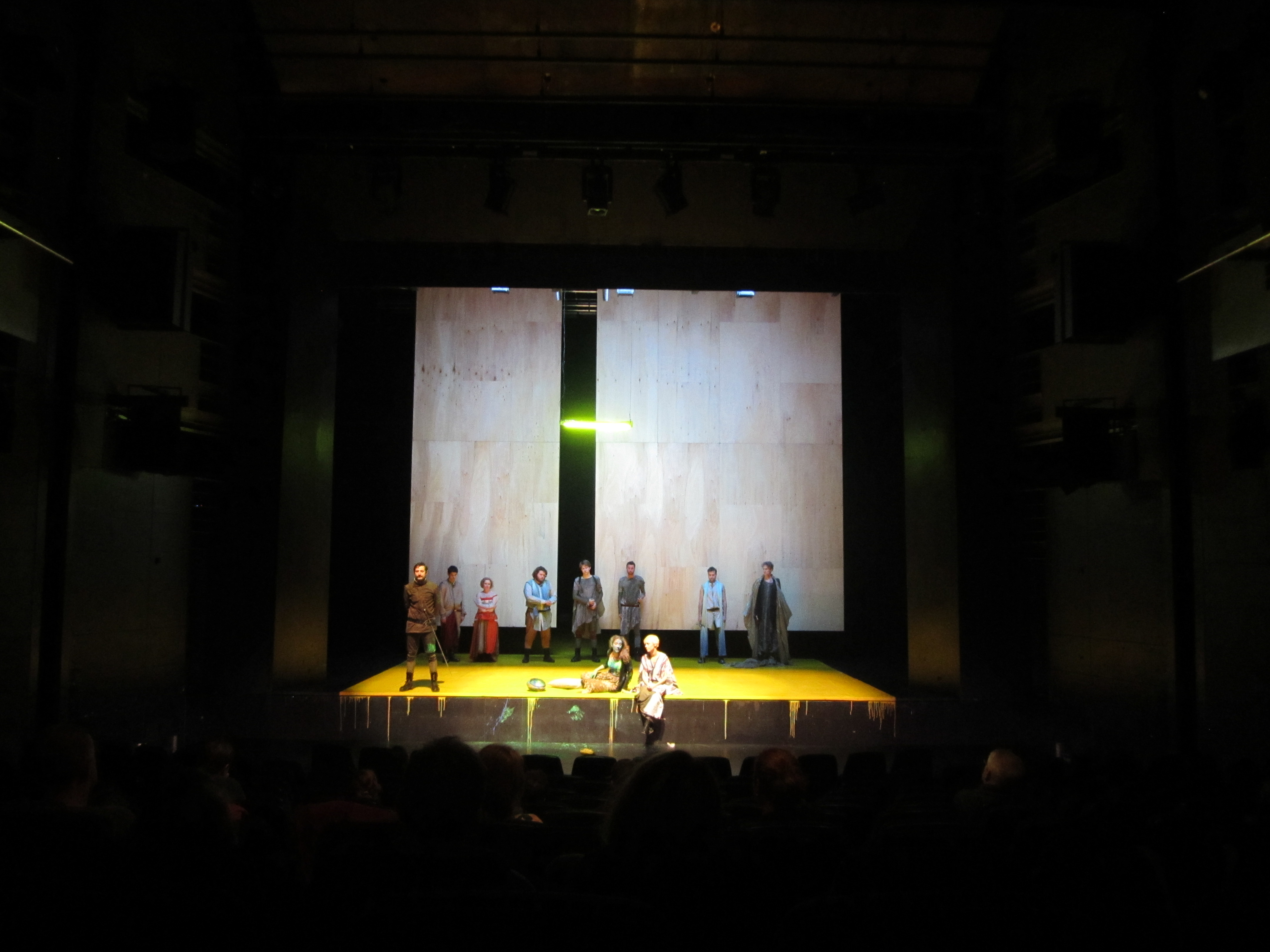 Snimak scenografije pozorišne predstave Otelo-JDP, 2012. Autor:Jasmina Holbus